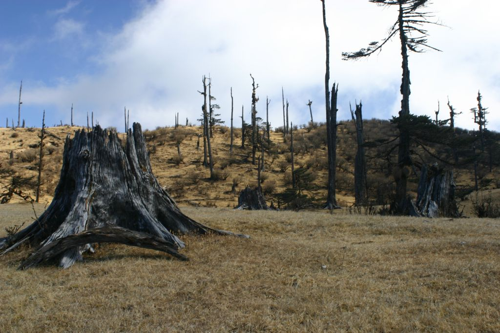 Singalila National Park